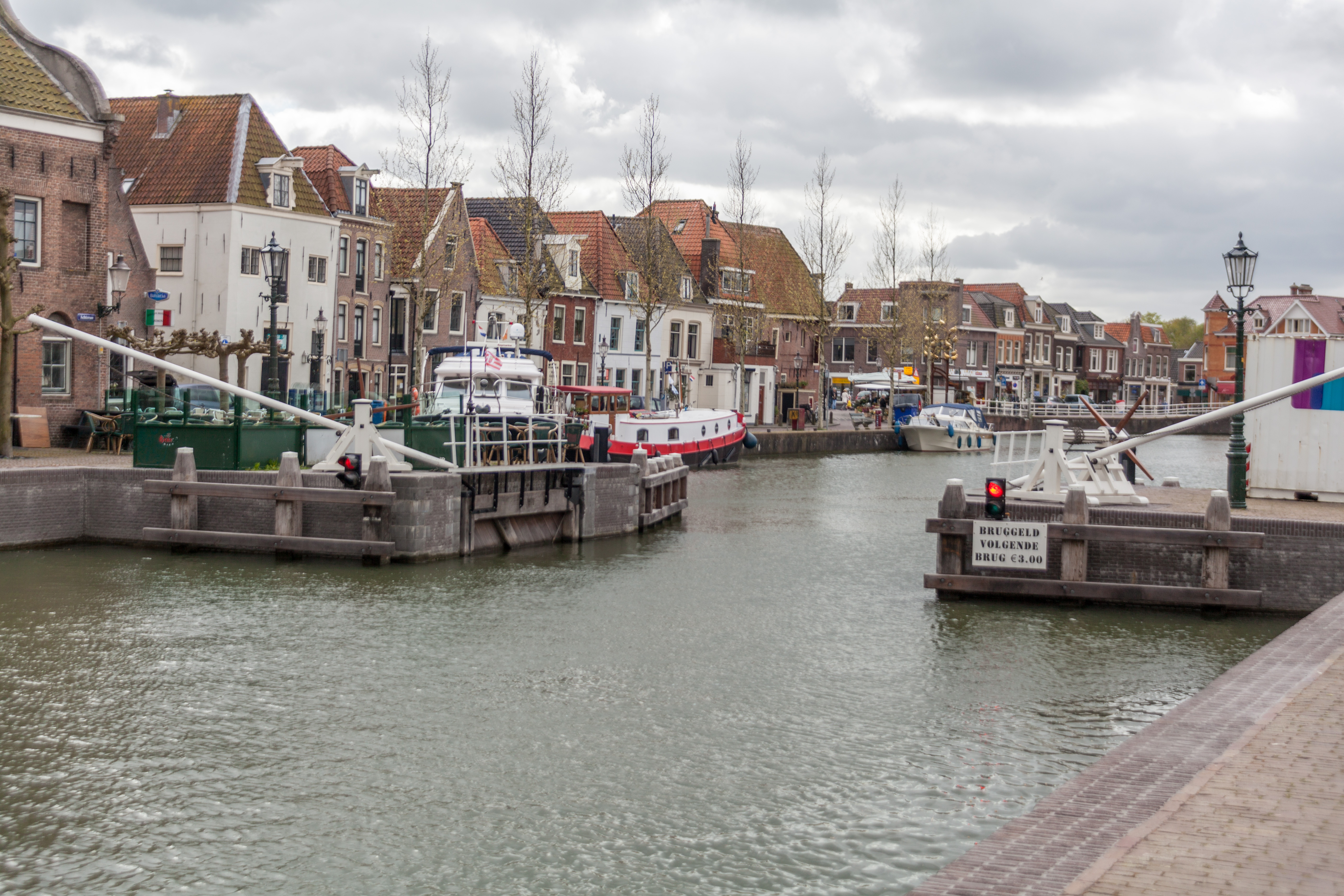 Weesp, Netherlands